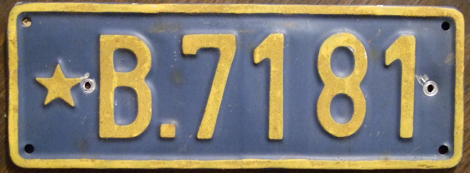 ZAIRE passenger